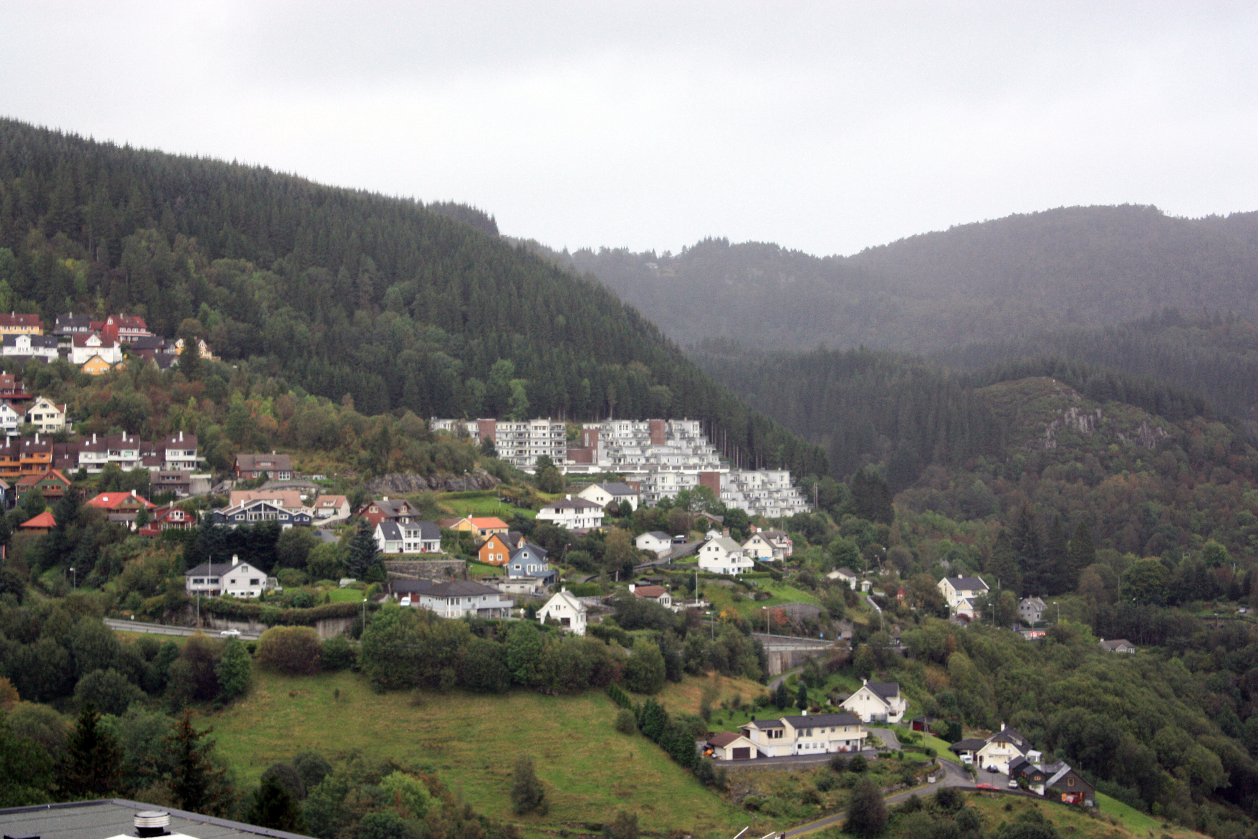 Hatlestadlia, Fana, Bergen.